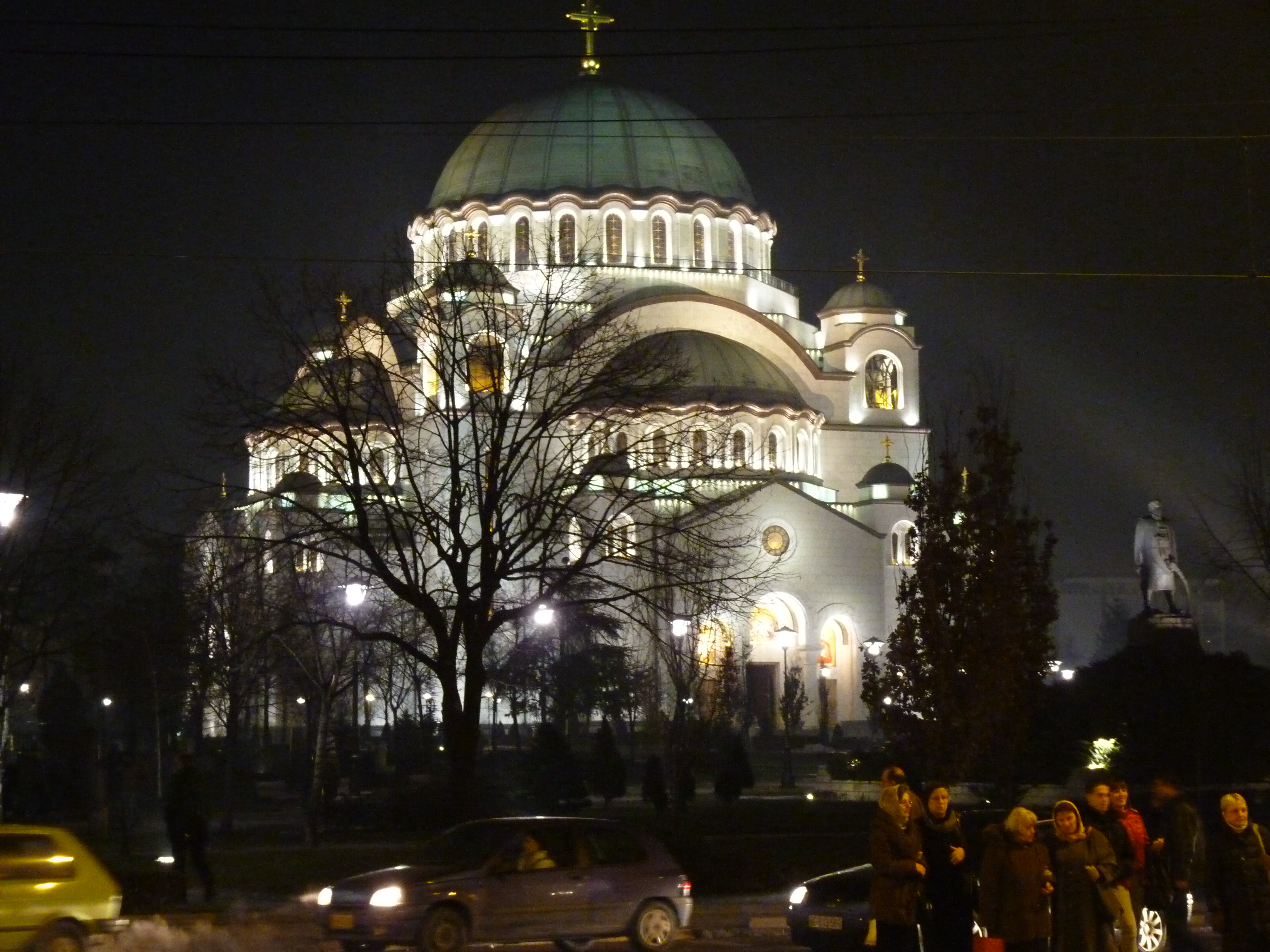 Храм светог Саве ноћу